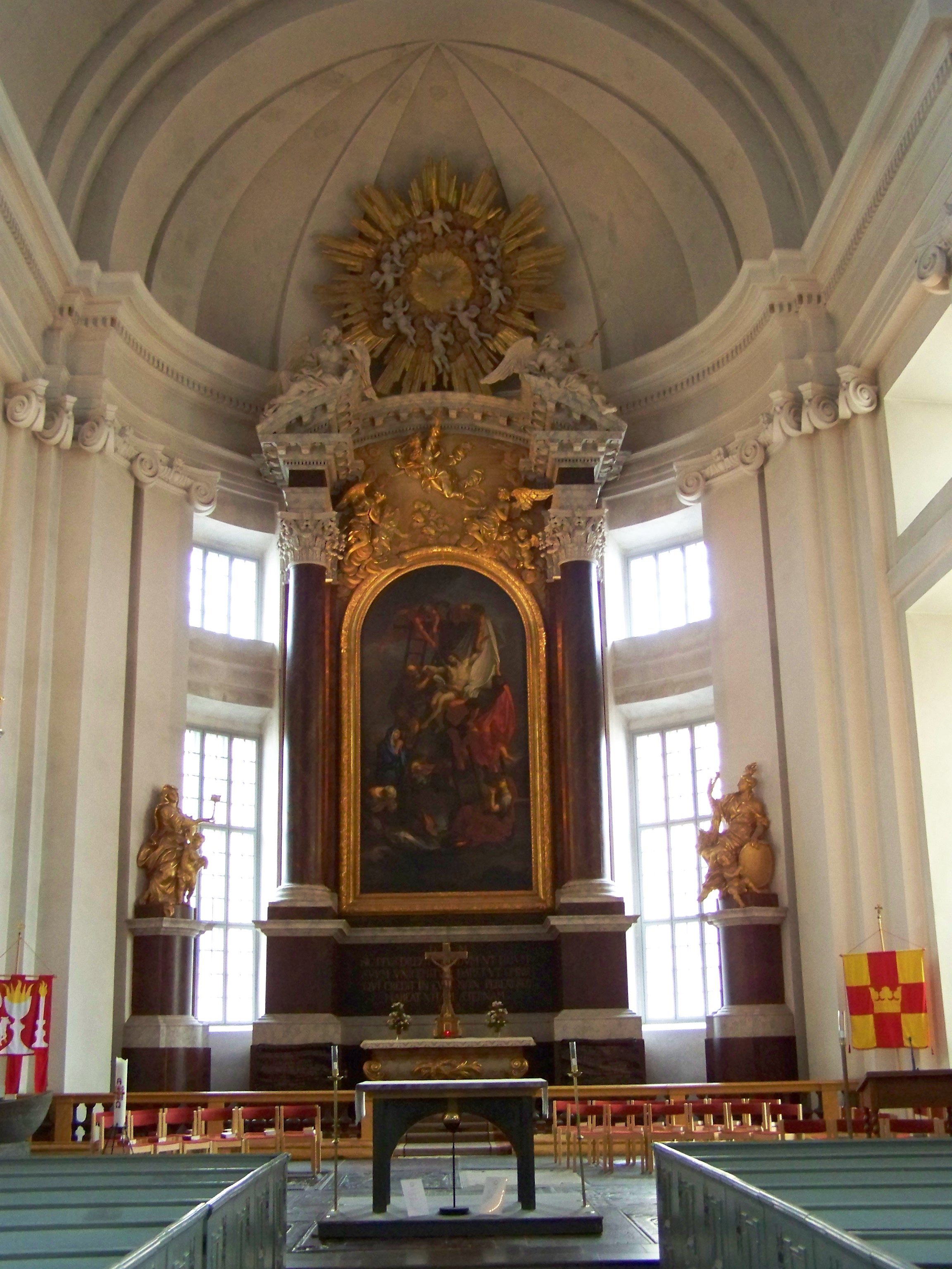 Kalmar,_Dom_Chor mit Altar